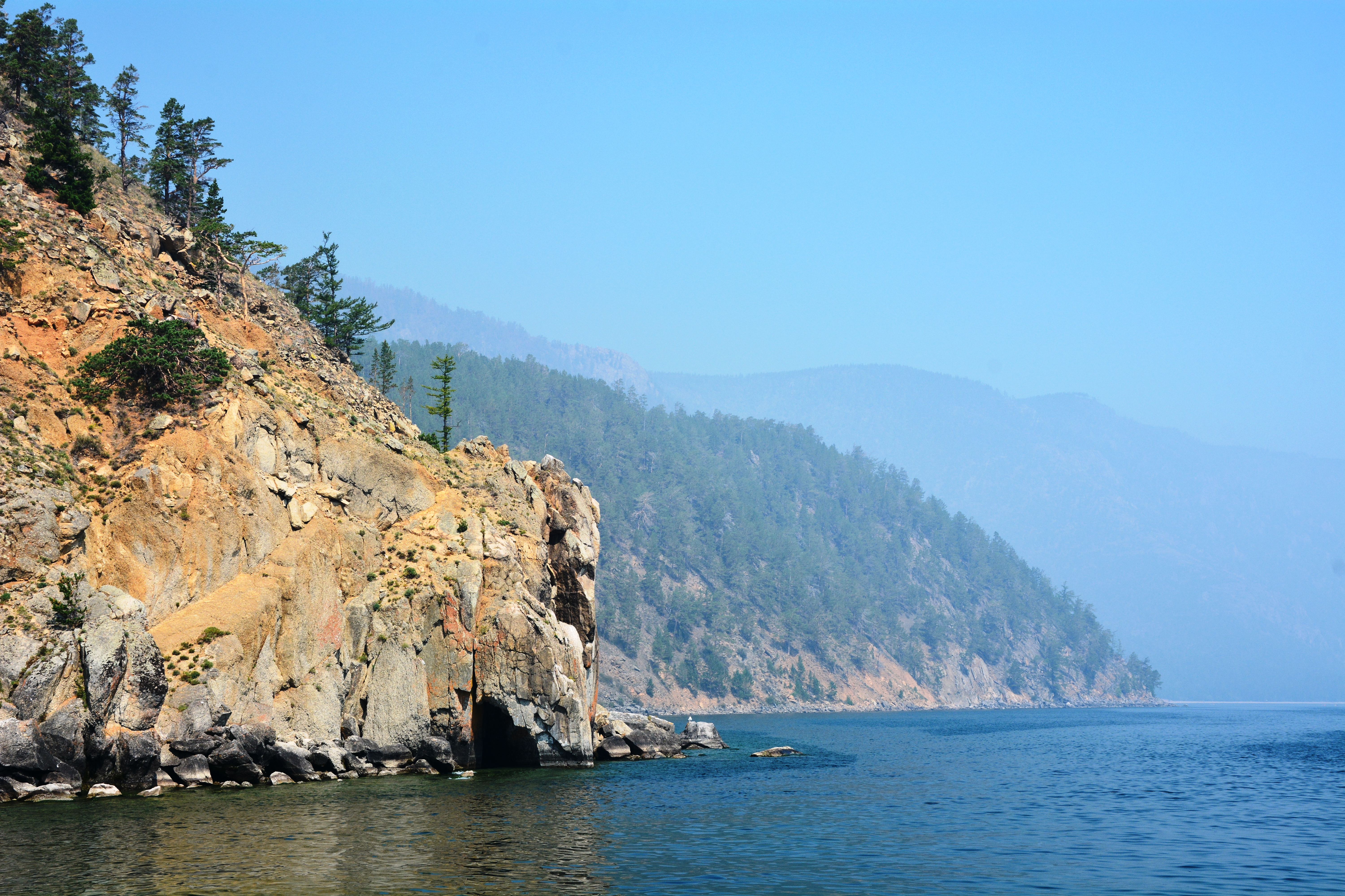 Мыс Арка: На территории Прибайкальского национального парка, координаты: N 52 21 959 E 105 49 604. Расположен примерно в 15 км к северу от бухты Песчаной,Иркутский район, Иркутская область This image is related to the protected area of Russia number 3810106